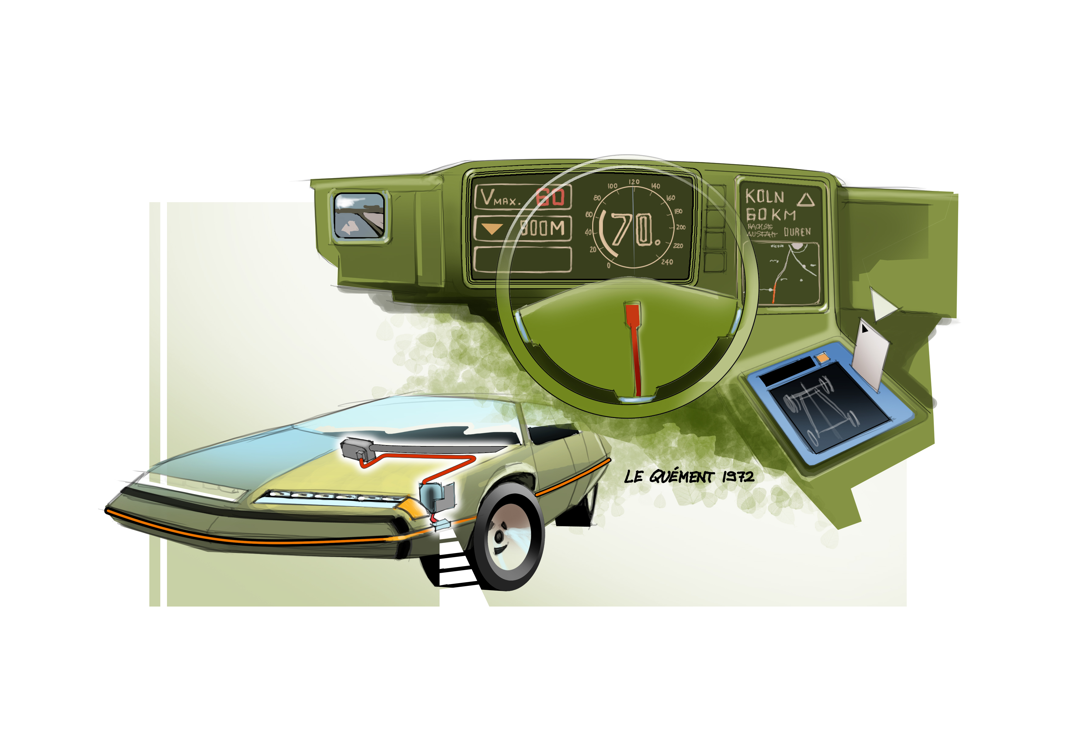 Dessin prospectif réalisé en 1972 par Patrick le Quément